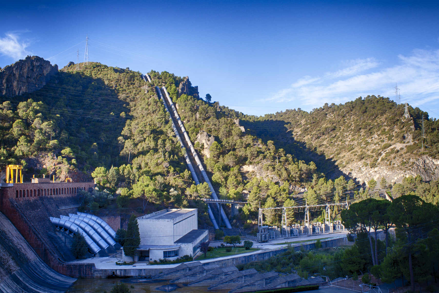 Embalse de Bolarque, 1910 Cauce del río Tajo Provincia de Guadalajara Castilla-La Mancha España